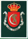 Fotografía de dominio público escaneada del escudo del Ayuntamiento de la noble y leal ciudad de Huete (Cuenca)